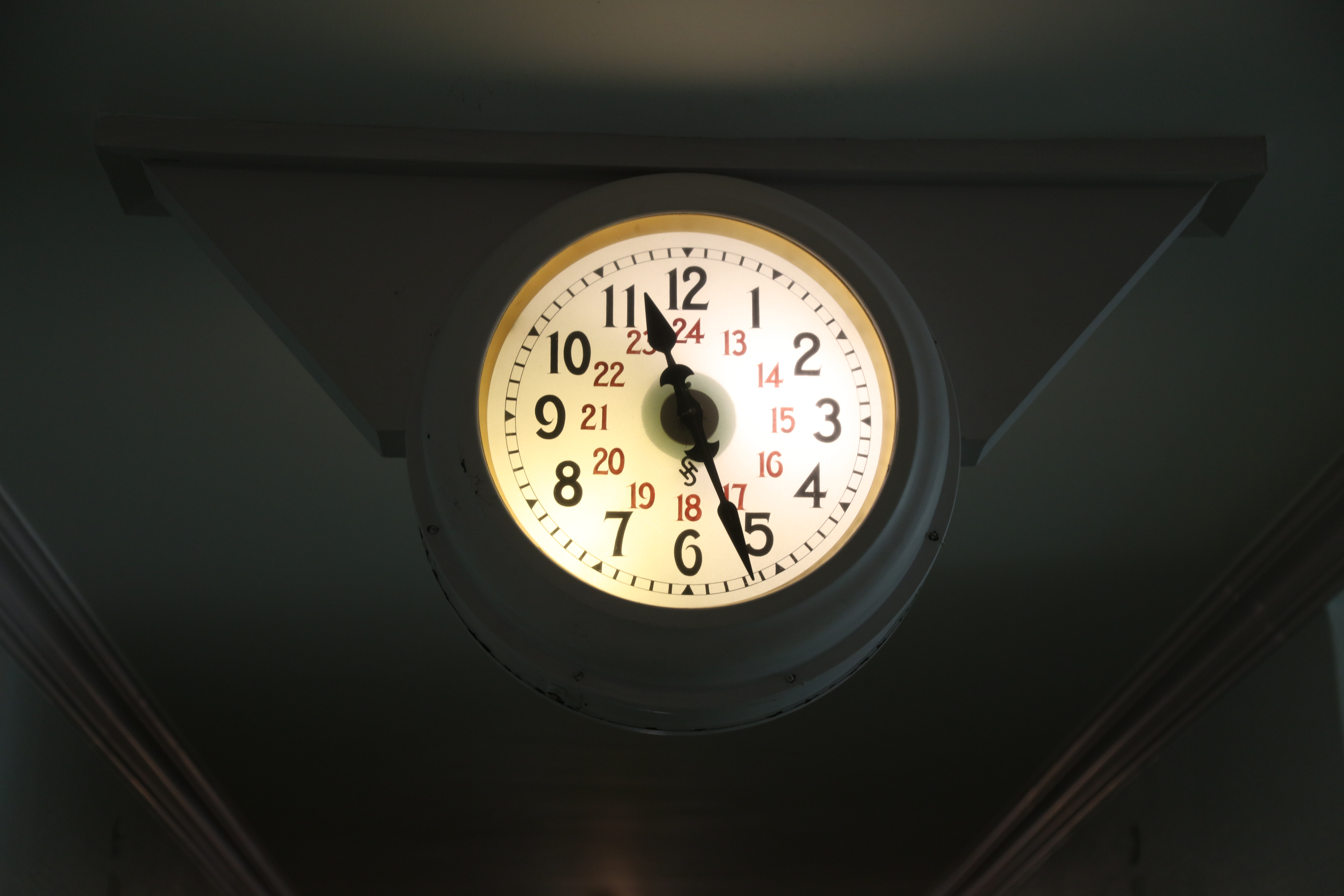 Nebenuhr in einem Gang des ehemaligen Sanatoriums Schatzalb, heute Berghotel, oberhalb Davos.